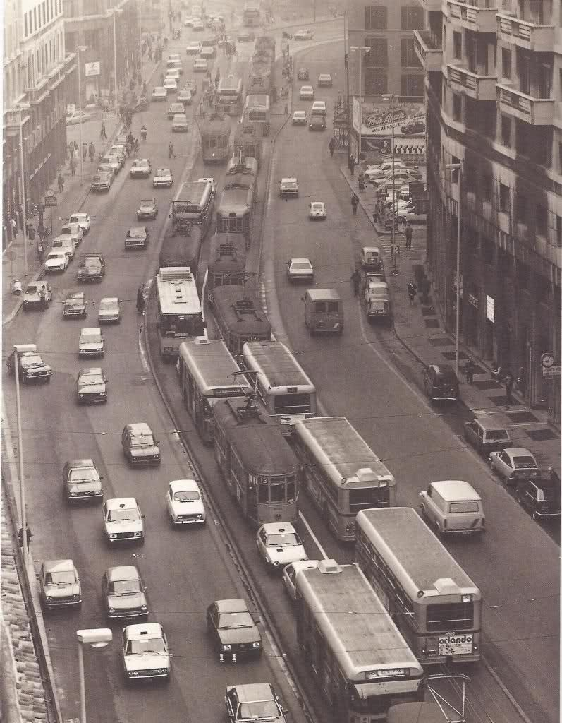 Milano, via Larga all'apertura dei nuovi impianti tranviari, lunedì 7 settembre 1981.